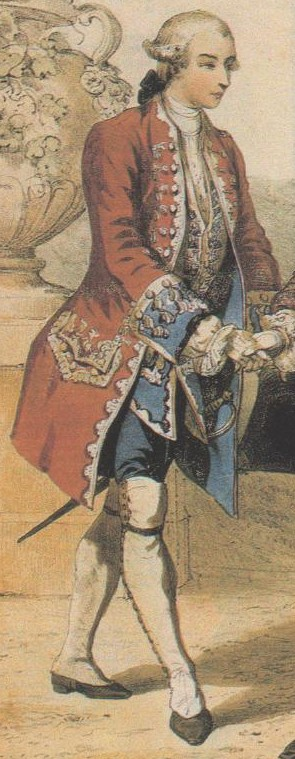 lithographie représentant un officier des gardes suisses (France), Versailles